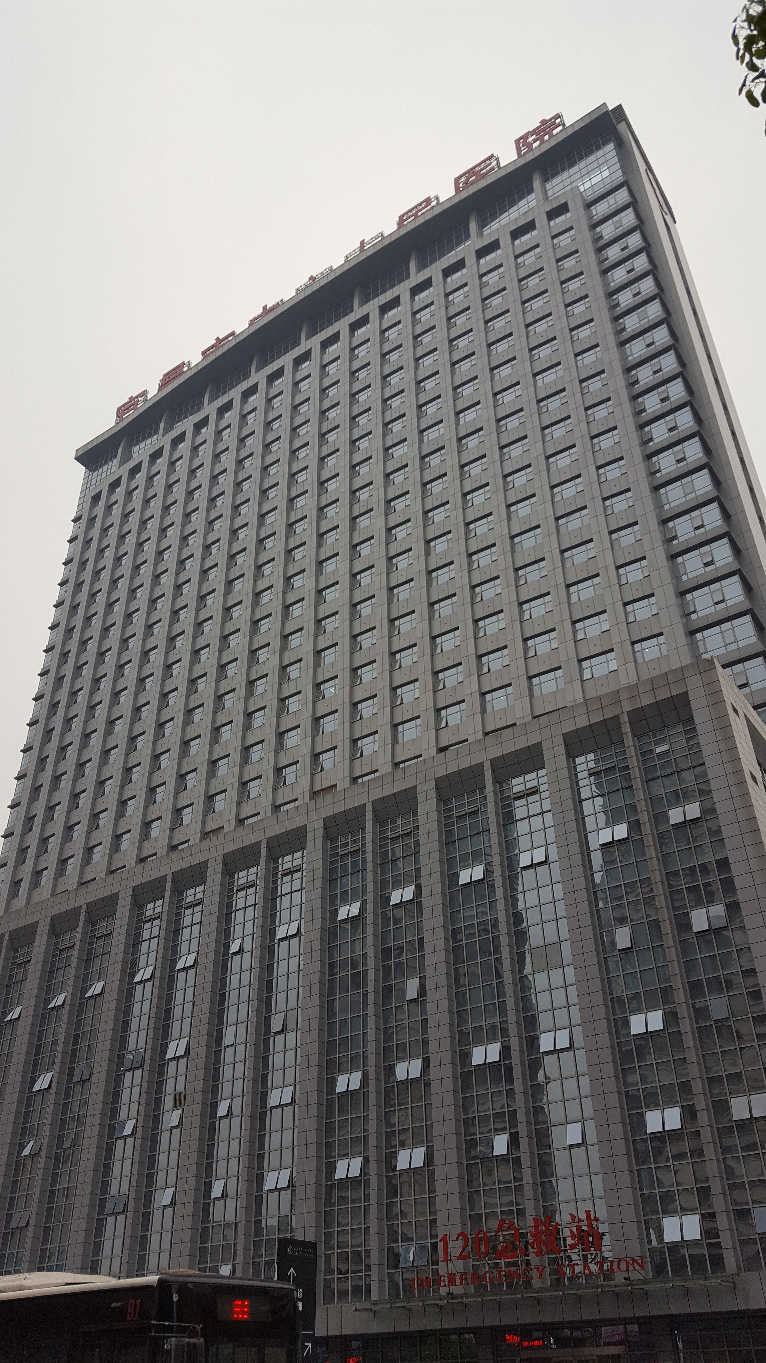 中文（中国大陆）: 宜昌市中心人民医院综合楼